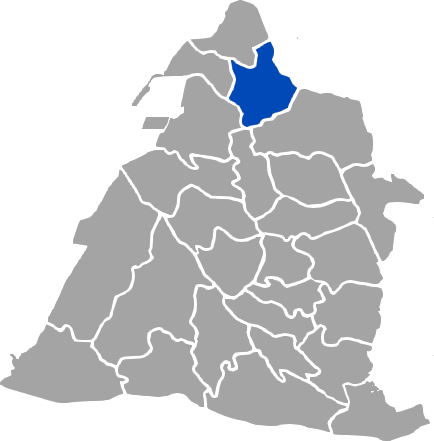 KaurJmeb為編寫臺灣省彰化縣和美鎮，於2005年1月23日所繪。